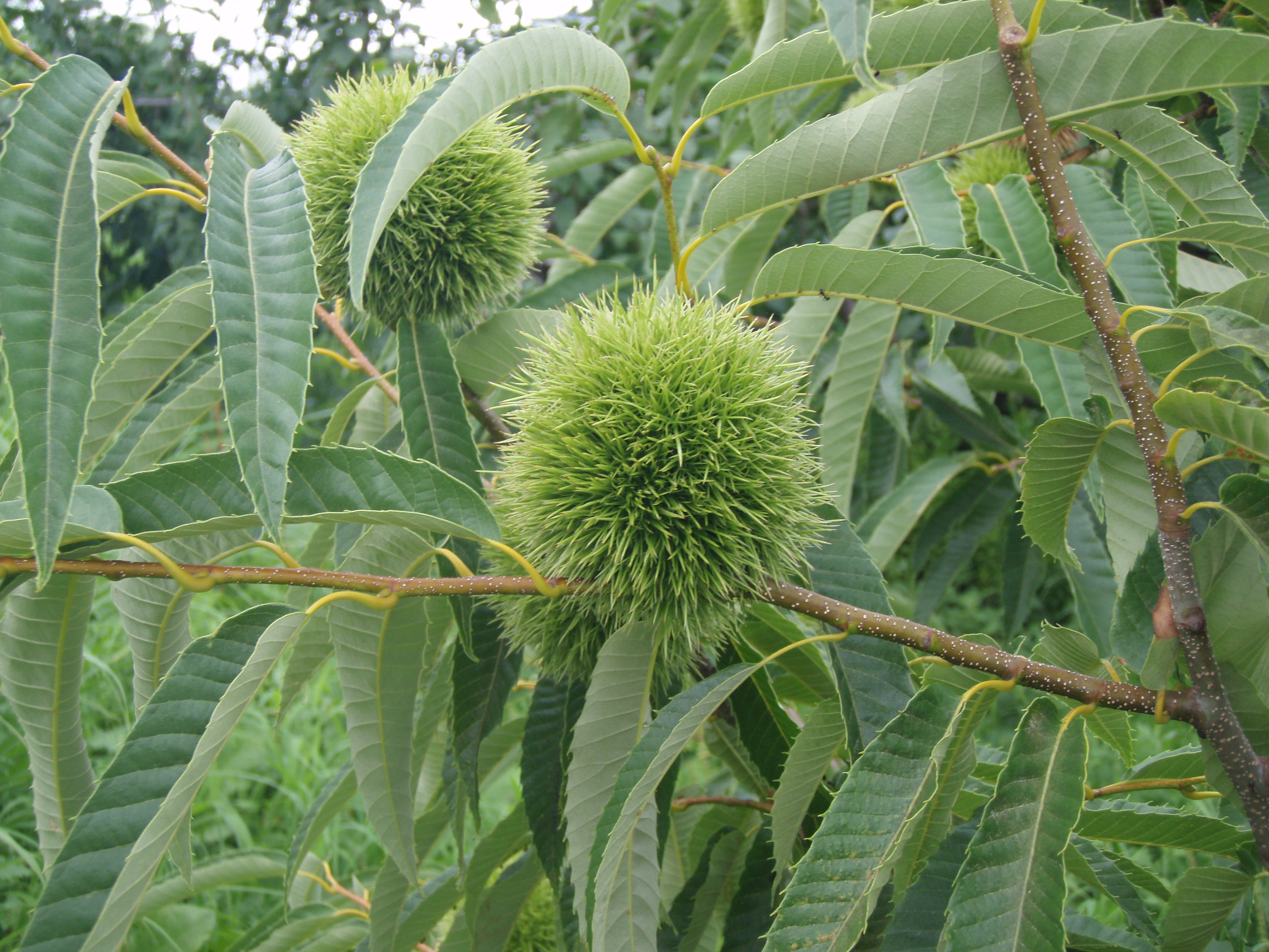 クリの幼果 (Nagano pref. Japan)